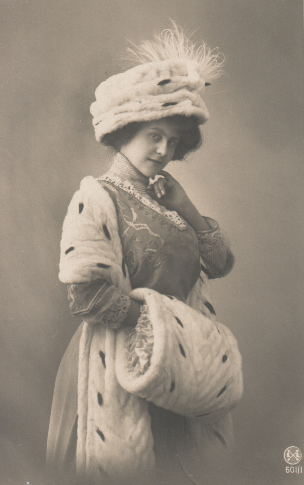 Postkarte, undatiert Dame mit Hermelinhut, -kollier und -muff, alles jeweils in üppiger Größe. Gemarkt mit L. L. 601/1